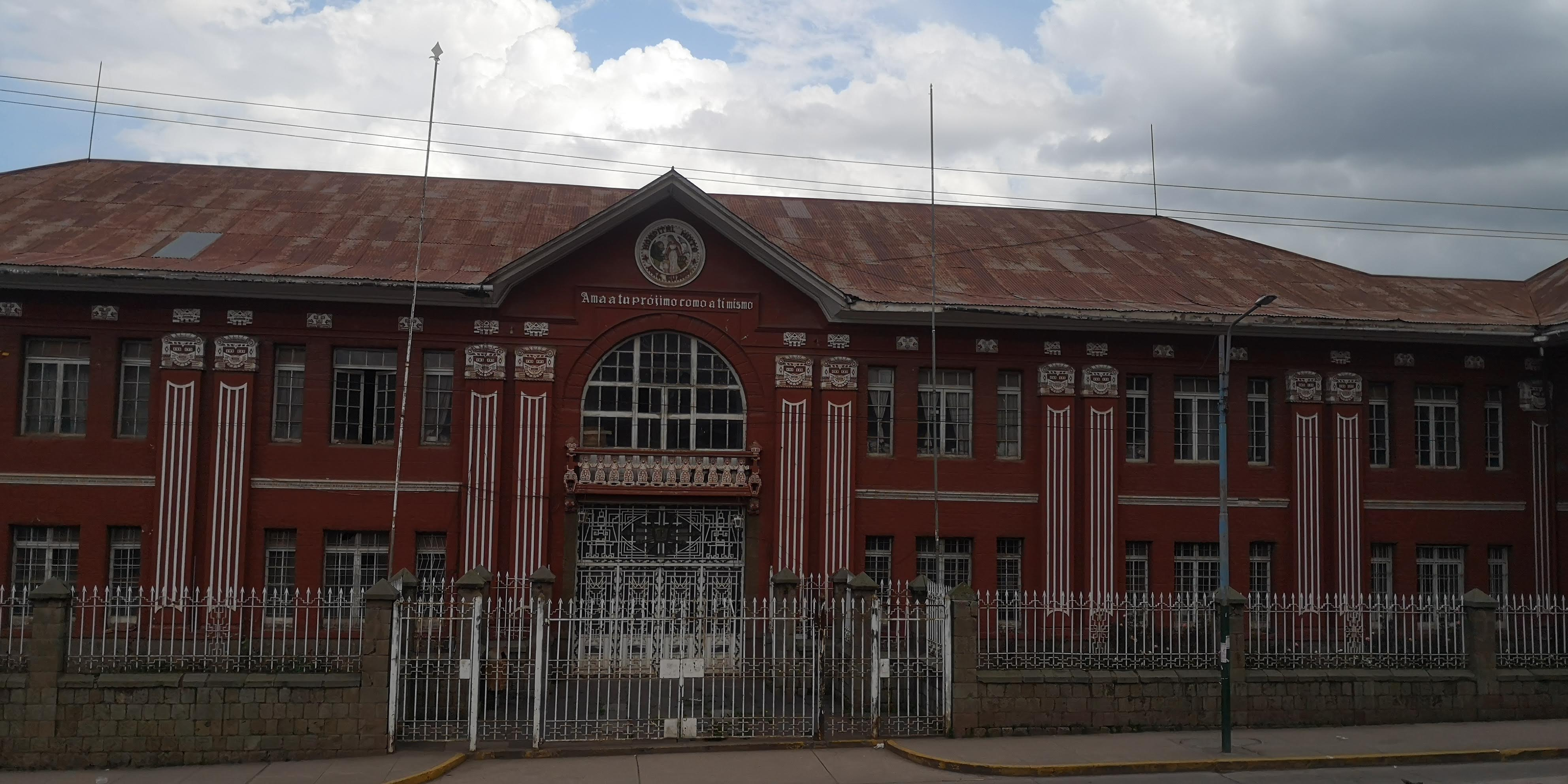 Vista de la antigua portada del hospital Antonio Lorena del Cusco, Perú